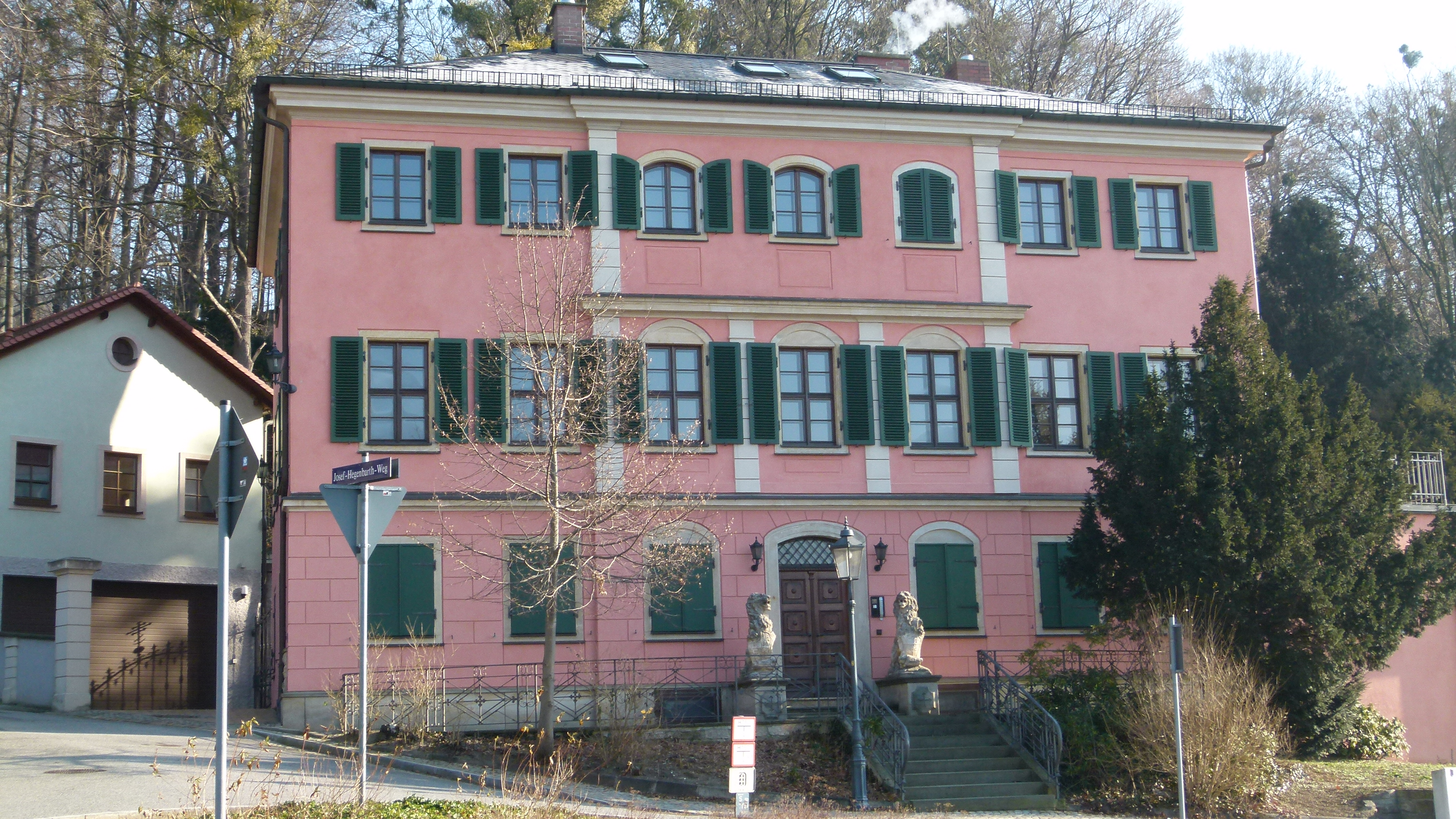 Denkmalgeschütztes Haus, Pillnitzer Landstraße 63, Loschwitz, Dresden